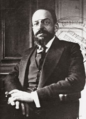 ИОФФЕ Адольф Абрамович Посол СССР в Австрии 12.12.1924-19.06.1925